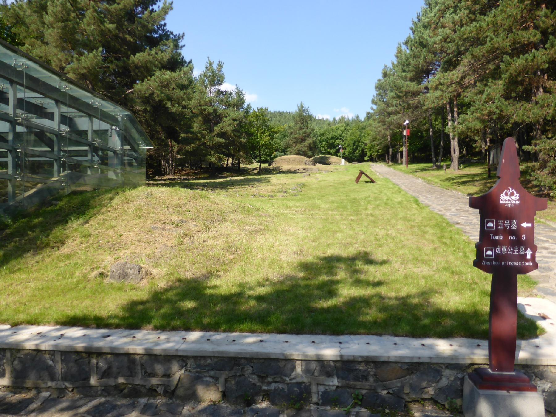 五号墓と奥に見える貞恵公主墓